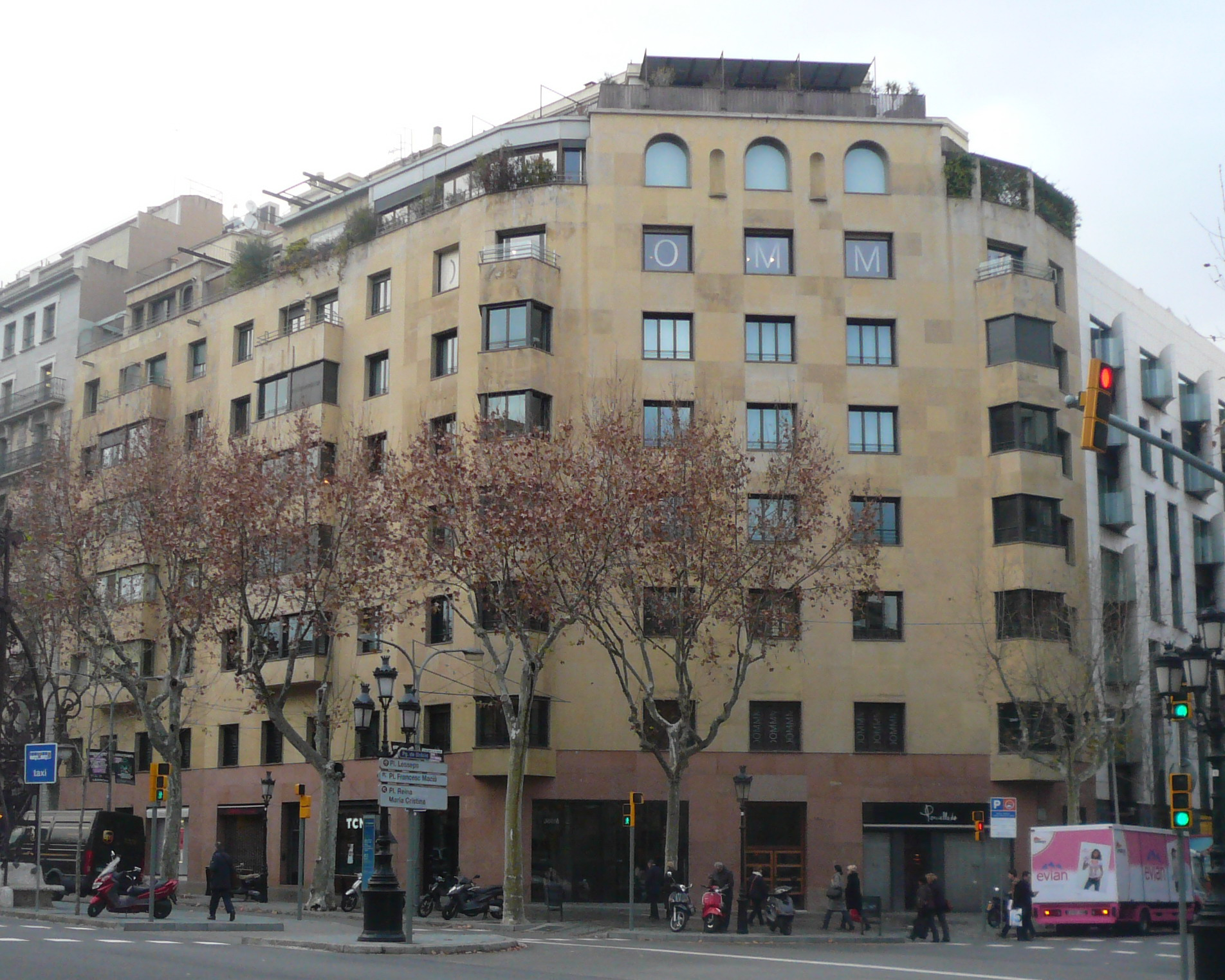 Edifici la Punyalada (1935-36), Barcelona, Passeig de Gràcia 104-108, de l'arquitecte Pere Benavent de Barberà.